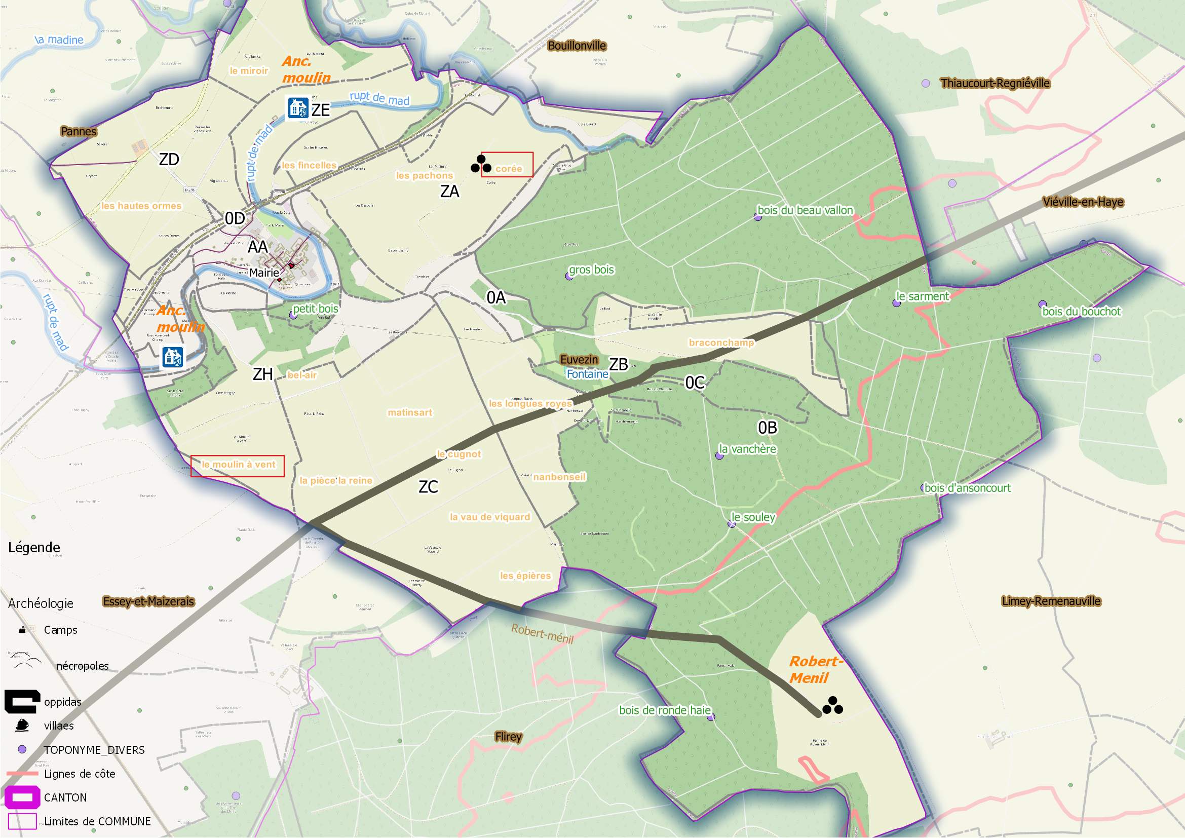 Euvezin (ban communal) OSM et Qgis, mentions additionnelles